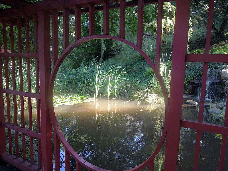 Gardzienice - Ogród japoński